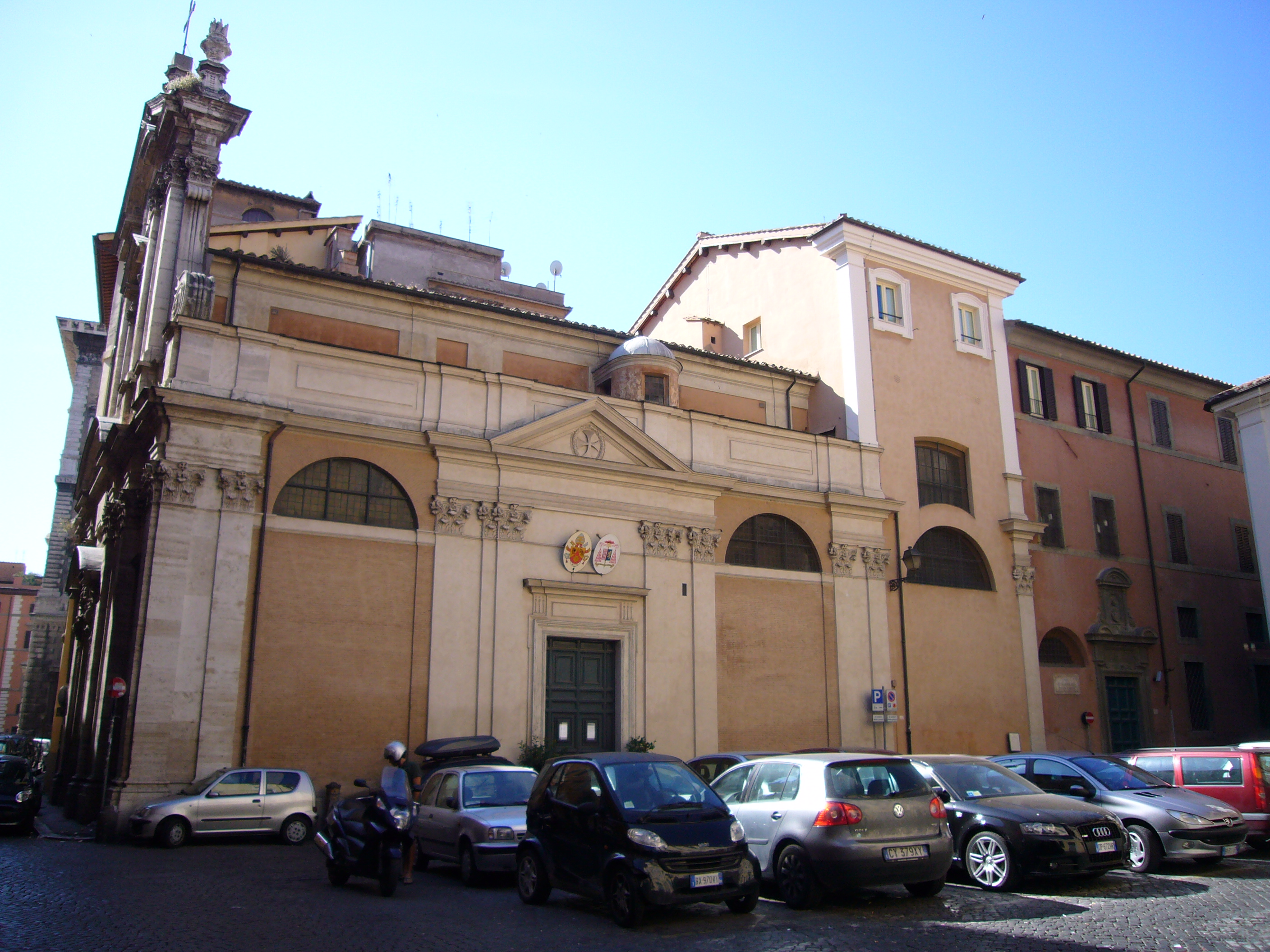 Roma, san Girolamo della Carità, fianco su piazza di santa Caterina della Rota